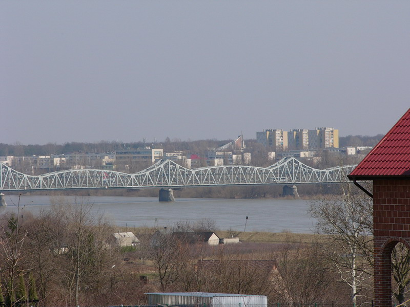 Puławy - most Mościckiego